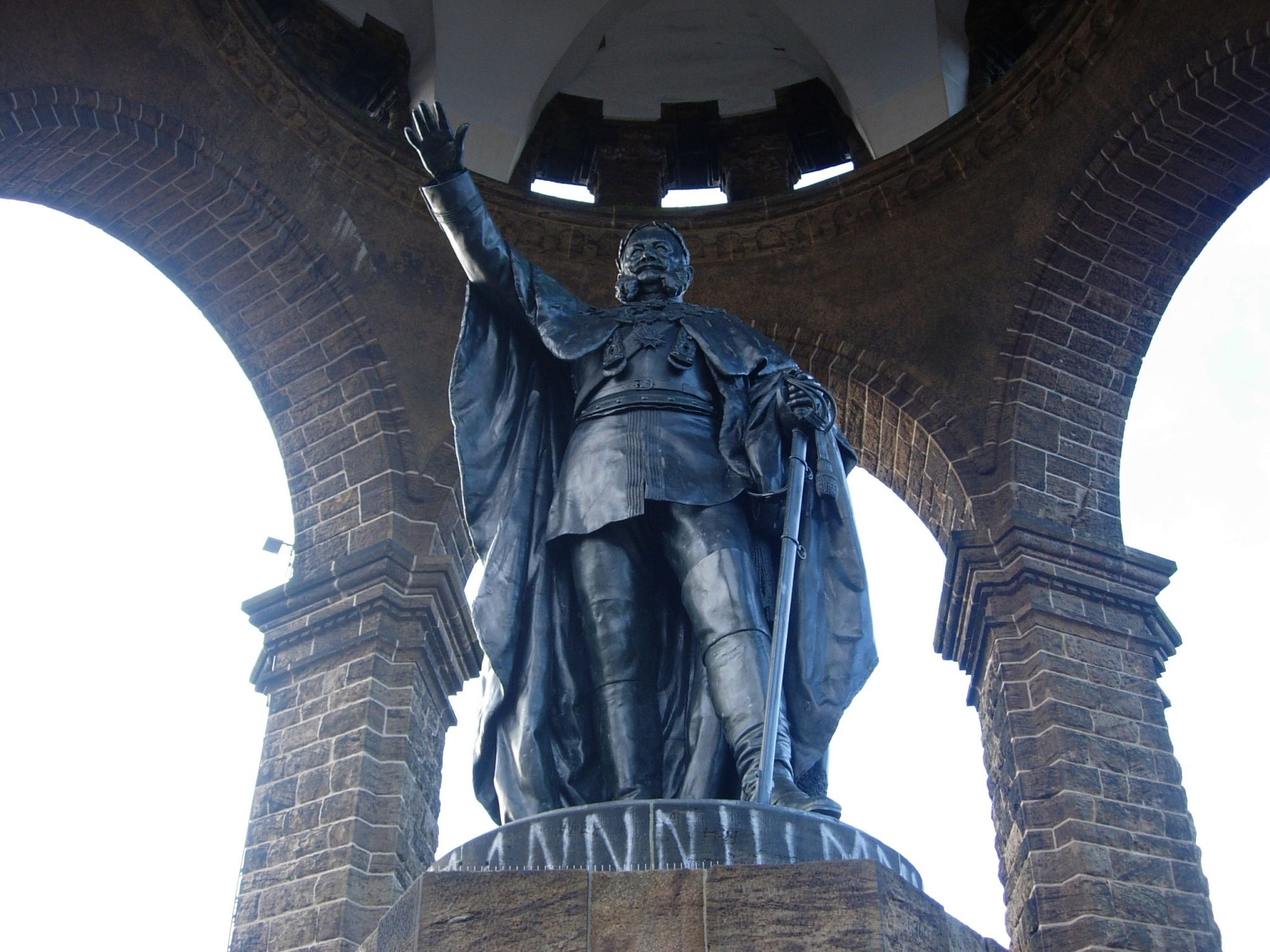 Kaiser-Wilhelm-Denkmal in Porta Wesfalica